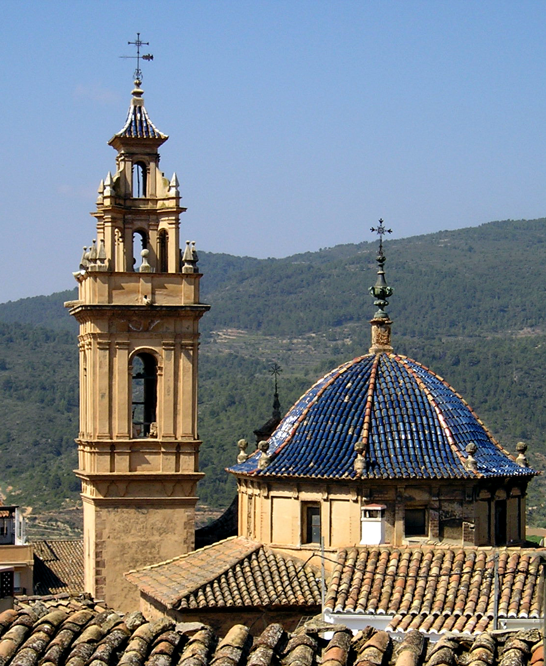 Iglesia de Nuestra Señora de Los Ángeles, Tuéjar (Valencia, España)